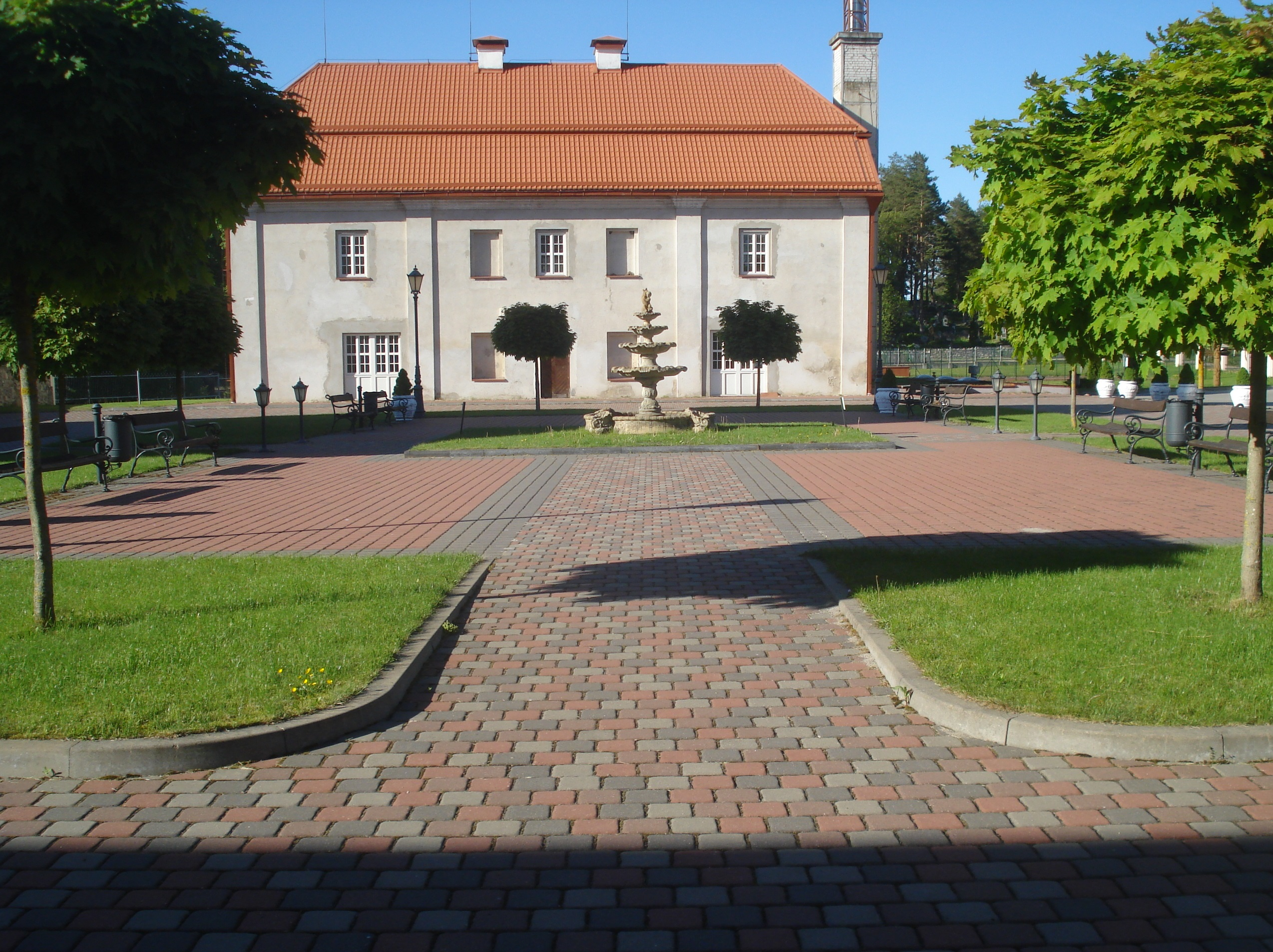 Бывший амбар бывшего доминиканского монастыря в Лишкяве (Литва)